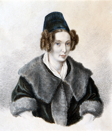 Александра Григорьевна Муравьева (1804-1832), ур. Чернышёва.